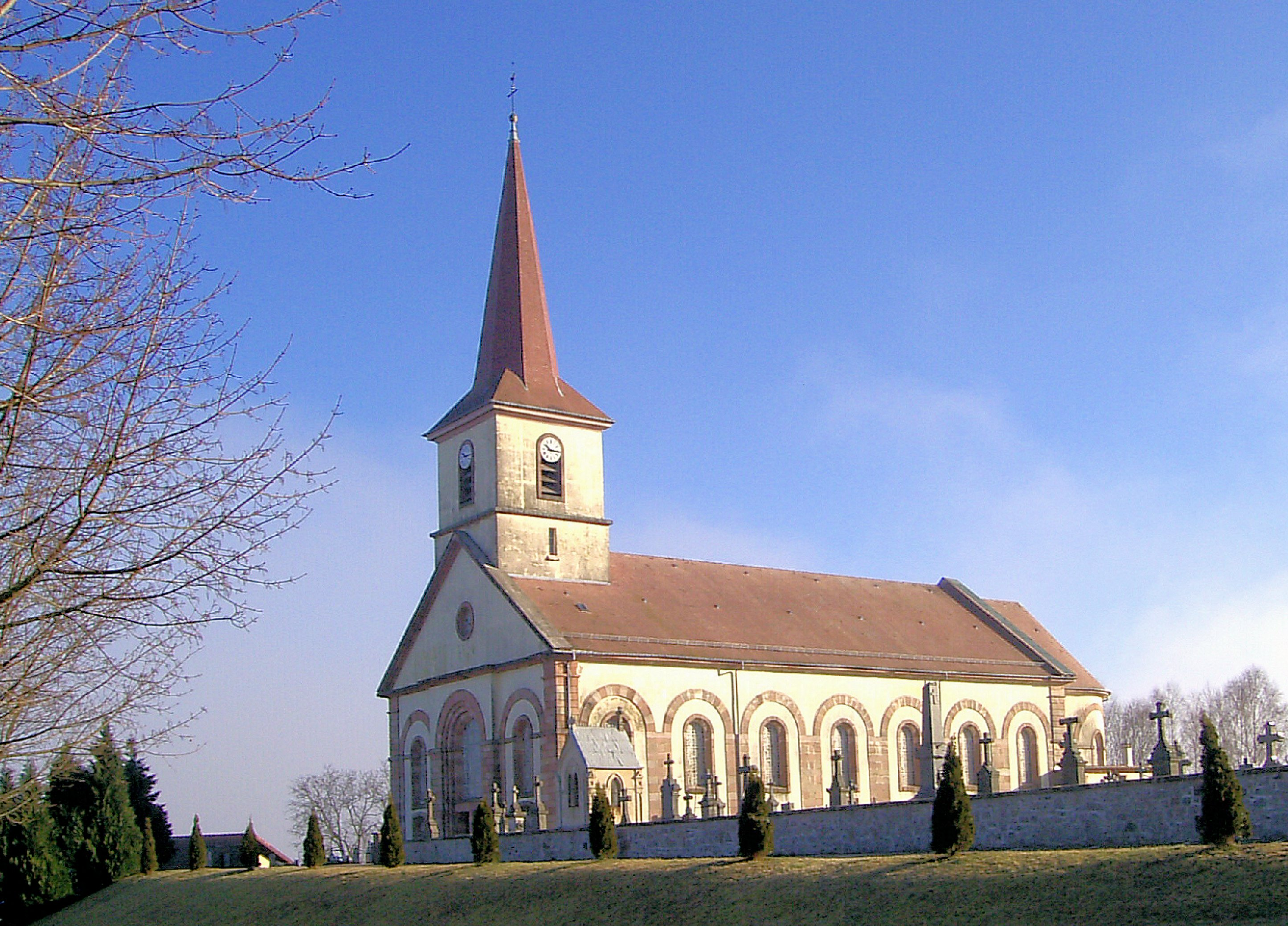 L'église Saint-Antoine d'Anould